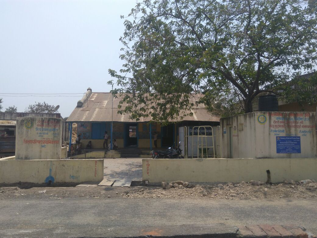 प्राथमिक शाळा,उंबरे